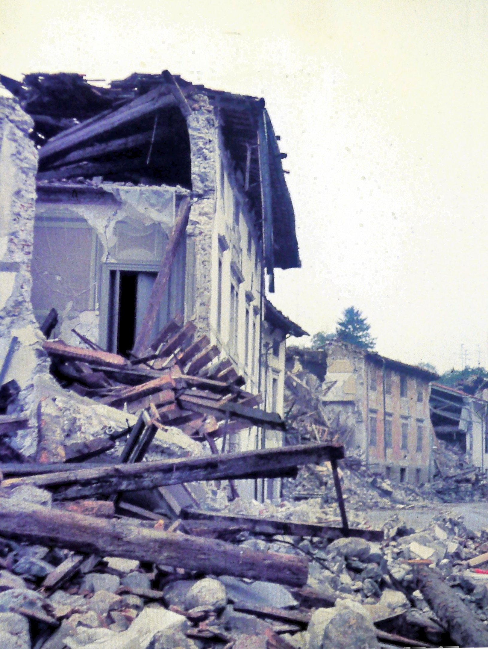 Ospedaletto di Gemona del Friuli - Via Nazionale dopo il terremoto del 1976